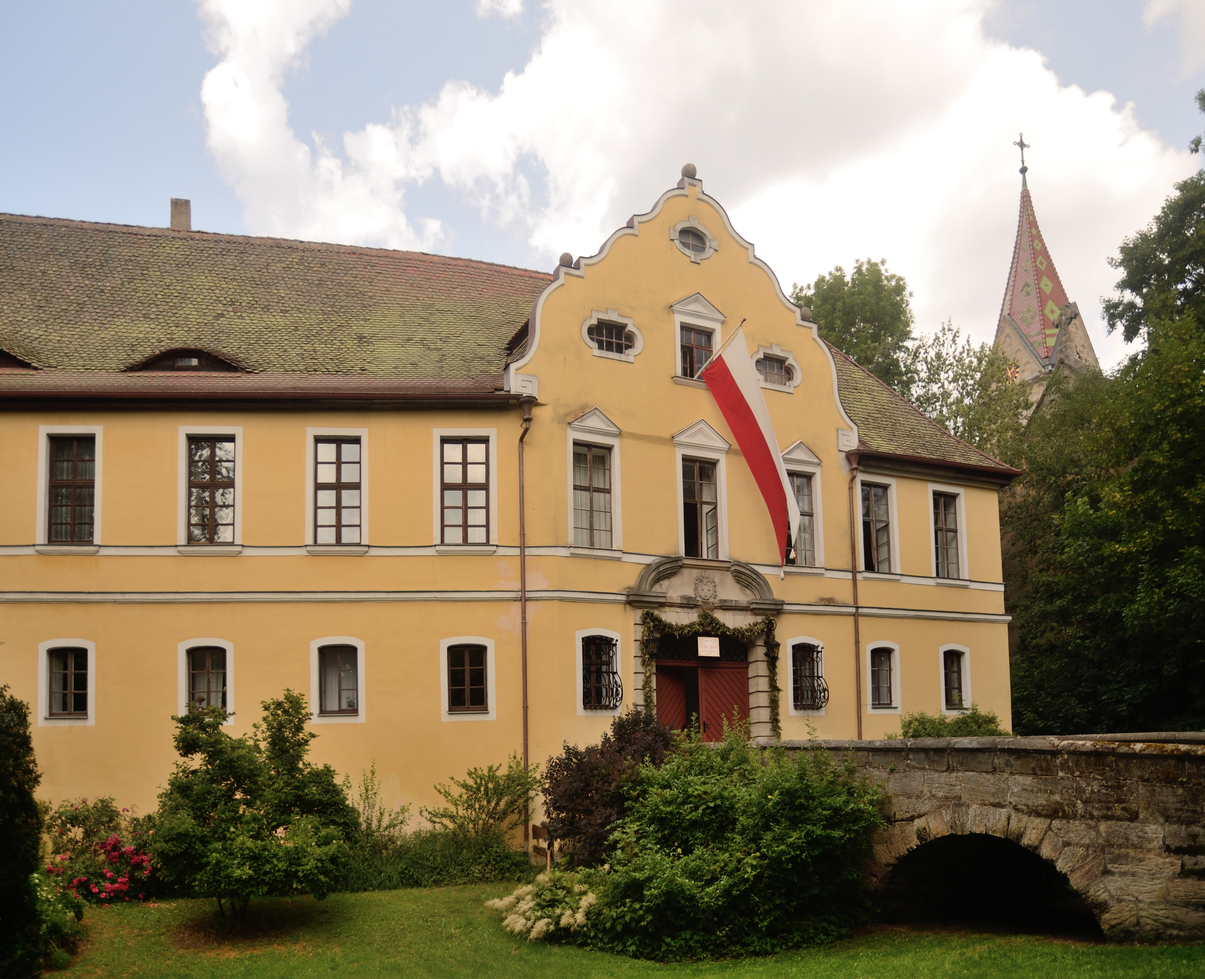 Südseite des Neuendettelsauer Schloss